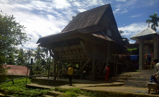 Potret sisa rumah adat pada 18/12/2016 oleh Arsen Sarumaha, Hilifarono.